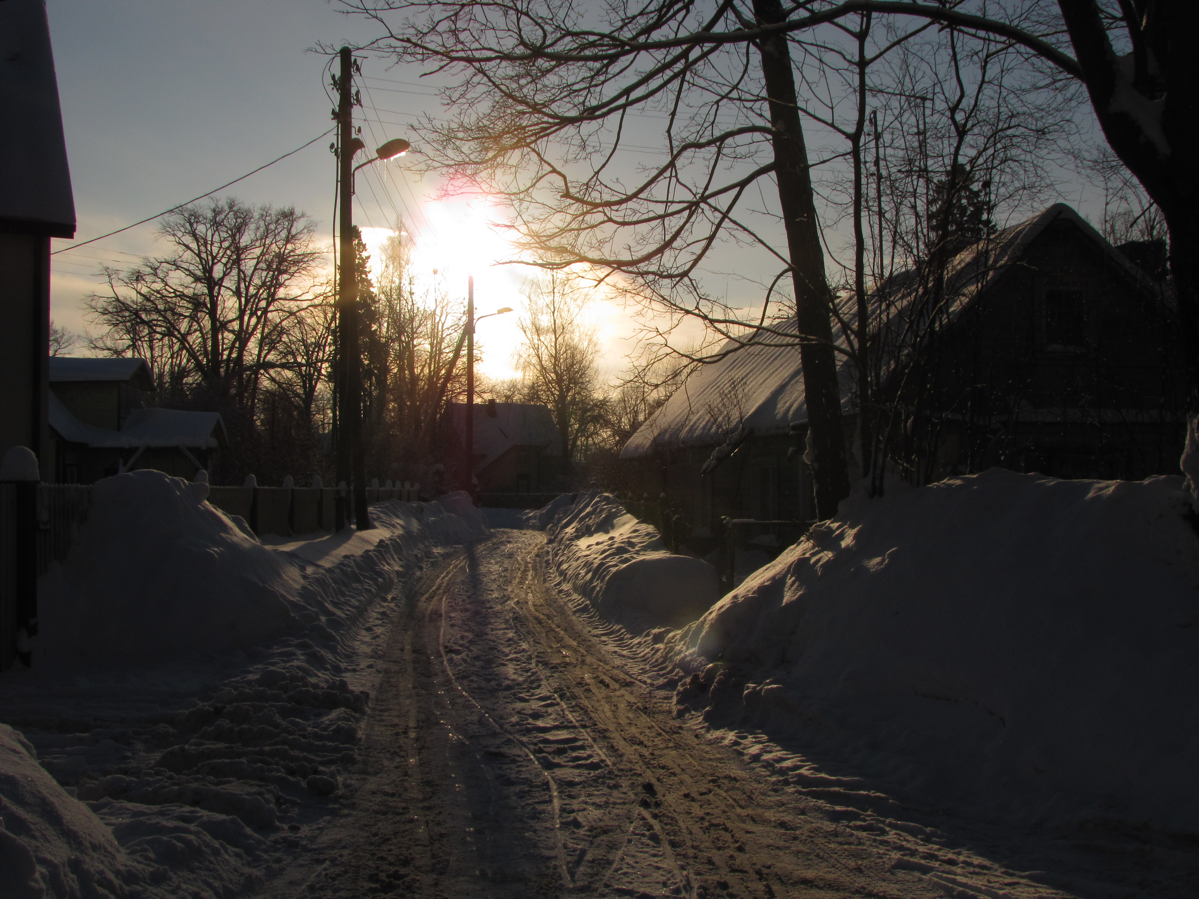 upes iela